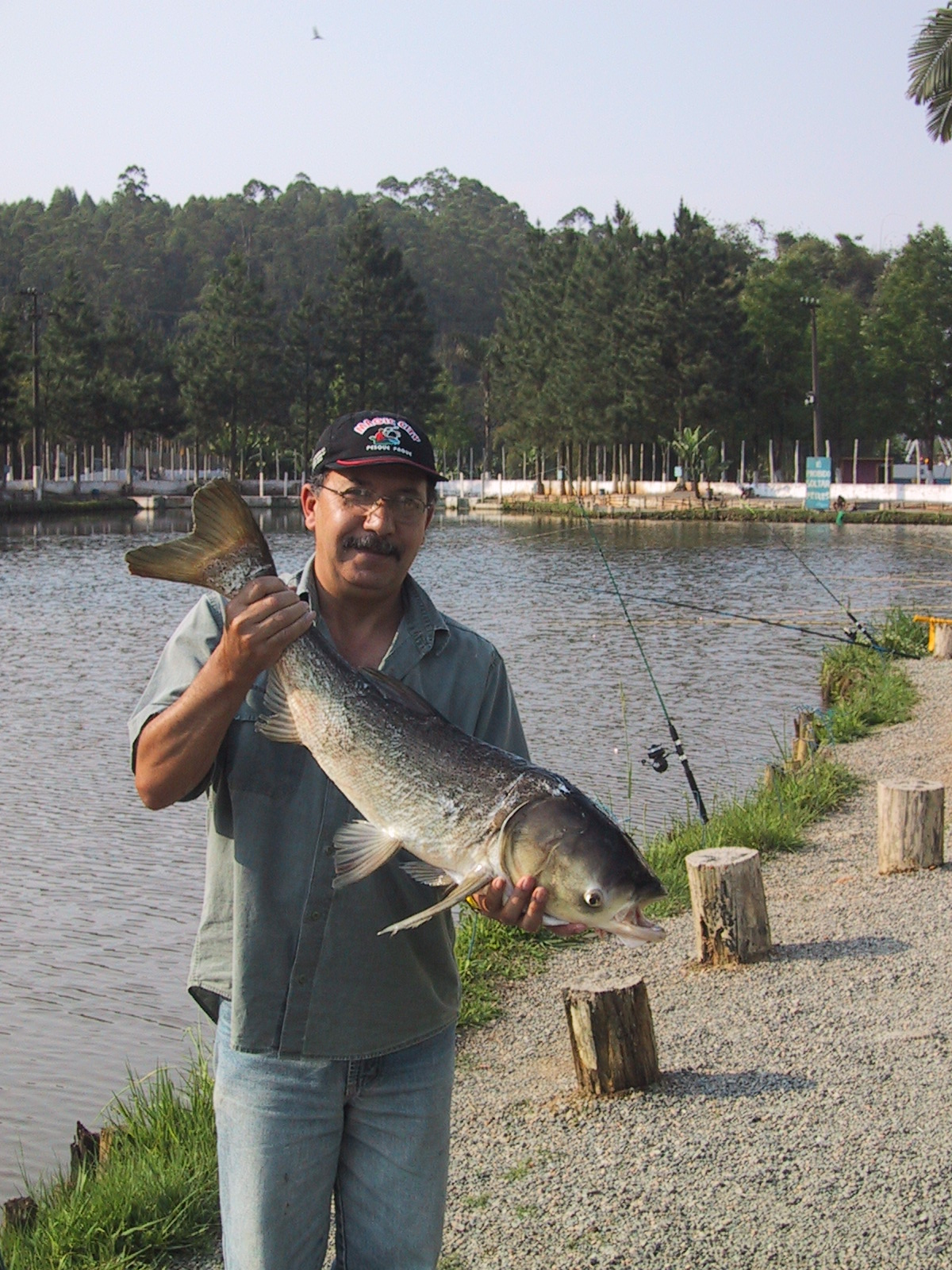 Pesqueiro